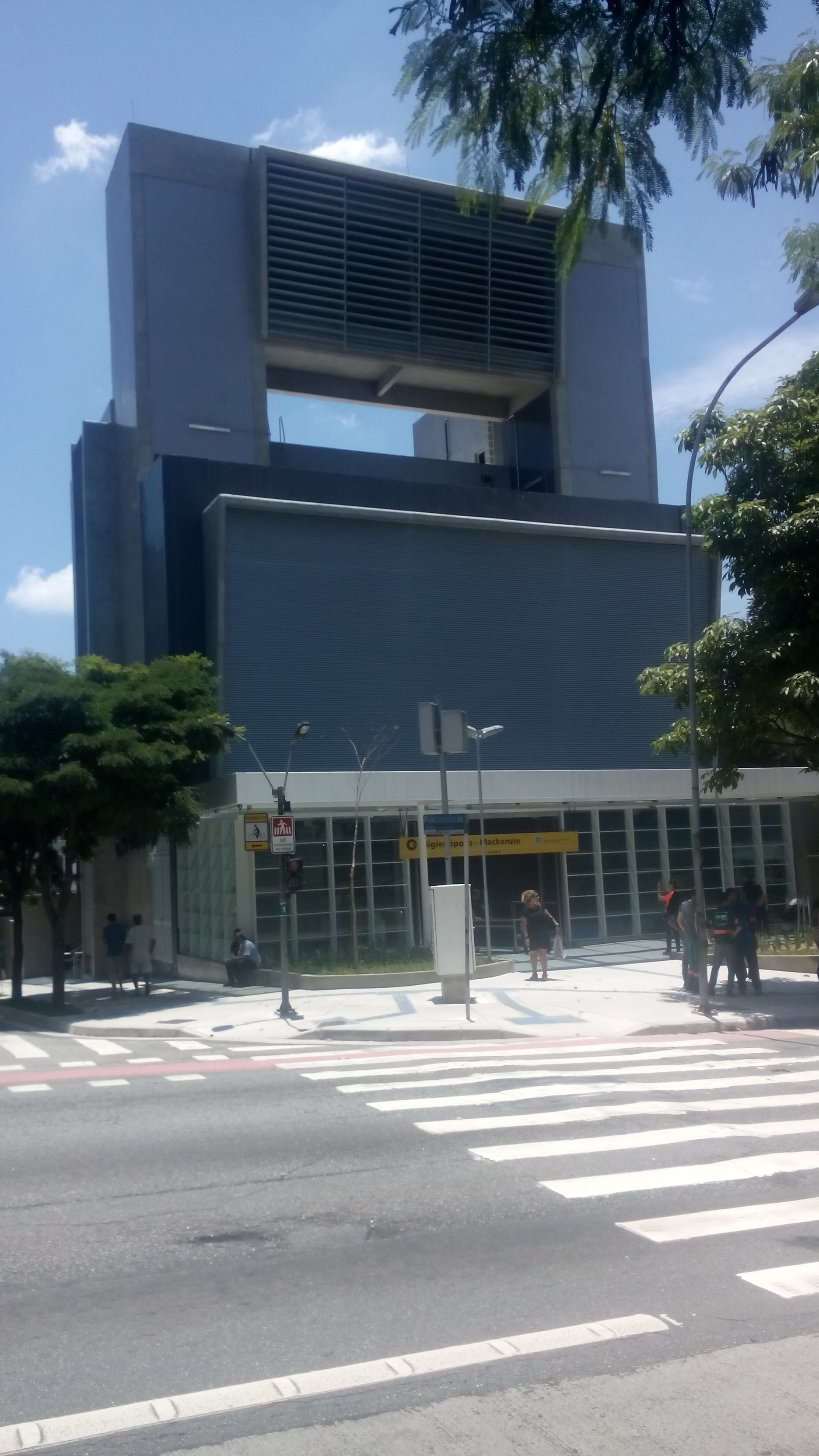 Estação Higienópolis-Mackenzie (Linha 4; ViaQuatro; São Paulo) no dia da inauguração